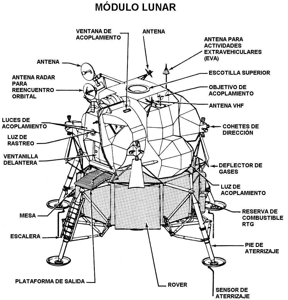 Esquema del Módulo Lunar empleado durante las misiones del Programa Apollo de la NASA.